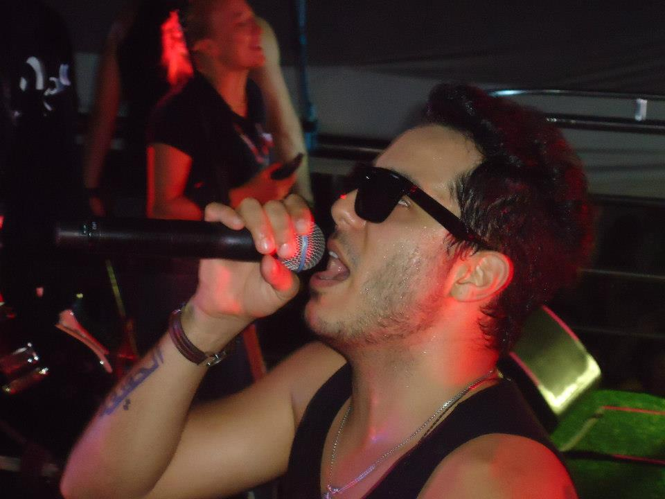 O cantor de axé Tomate na Limofolia, micareta do pré-carnaval de Limoeiro do Norte, no Ceará